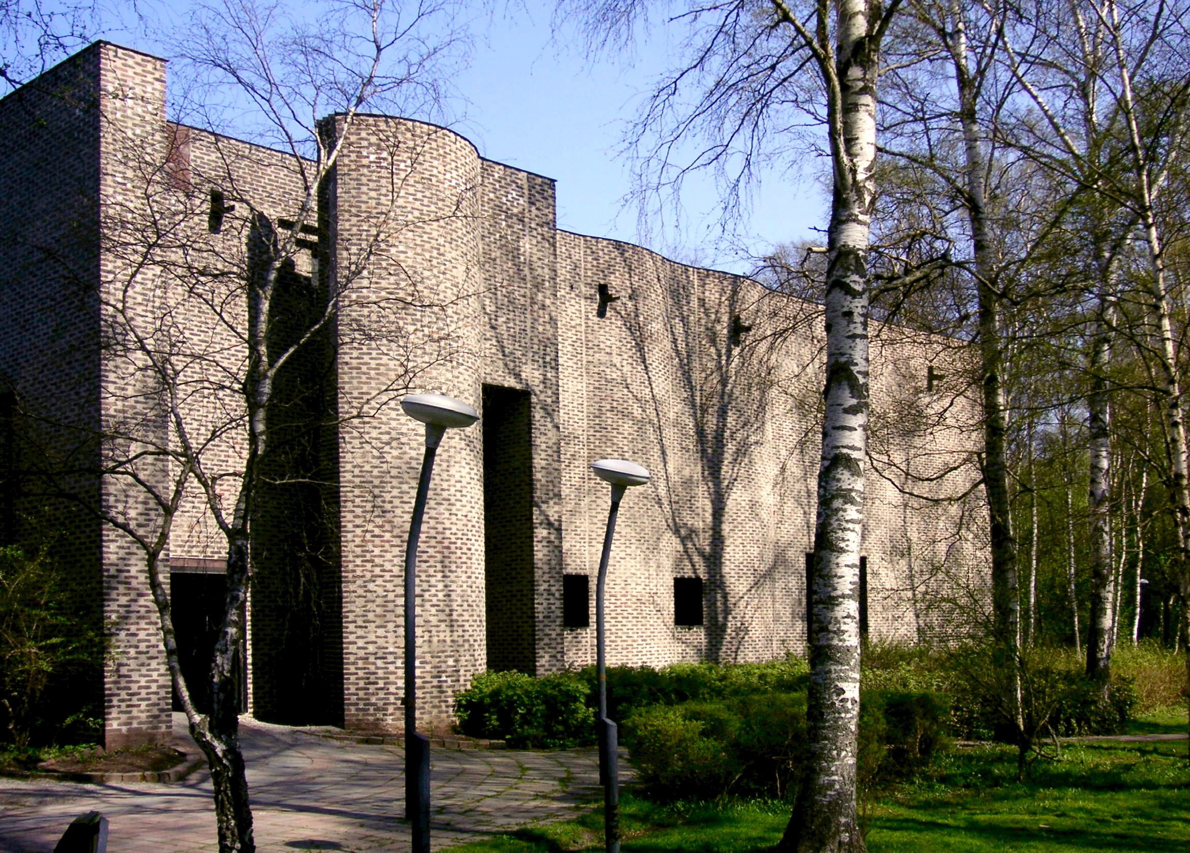 Markuskyrkan i Björkhagen, Stockholm